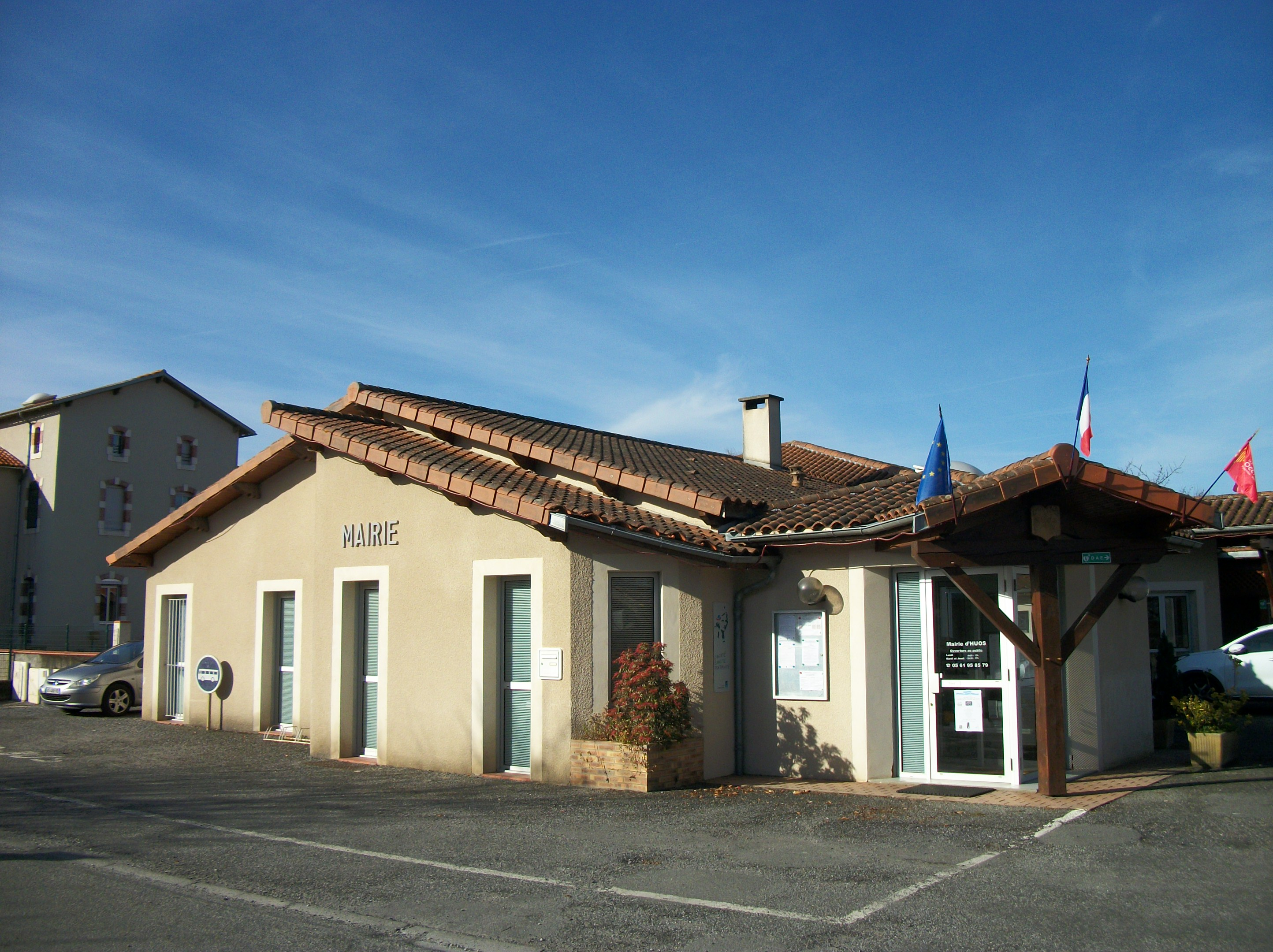 Mairie